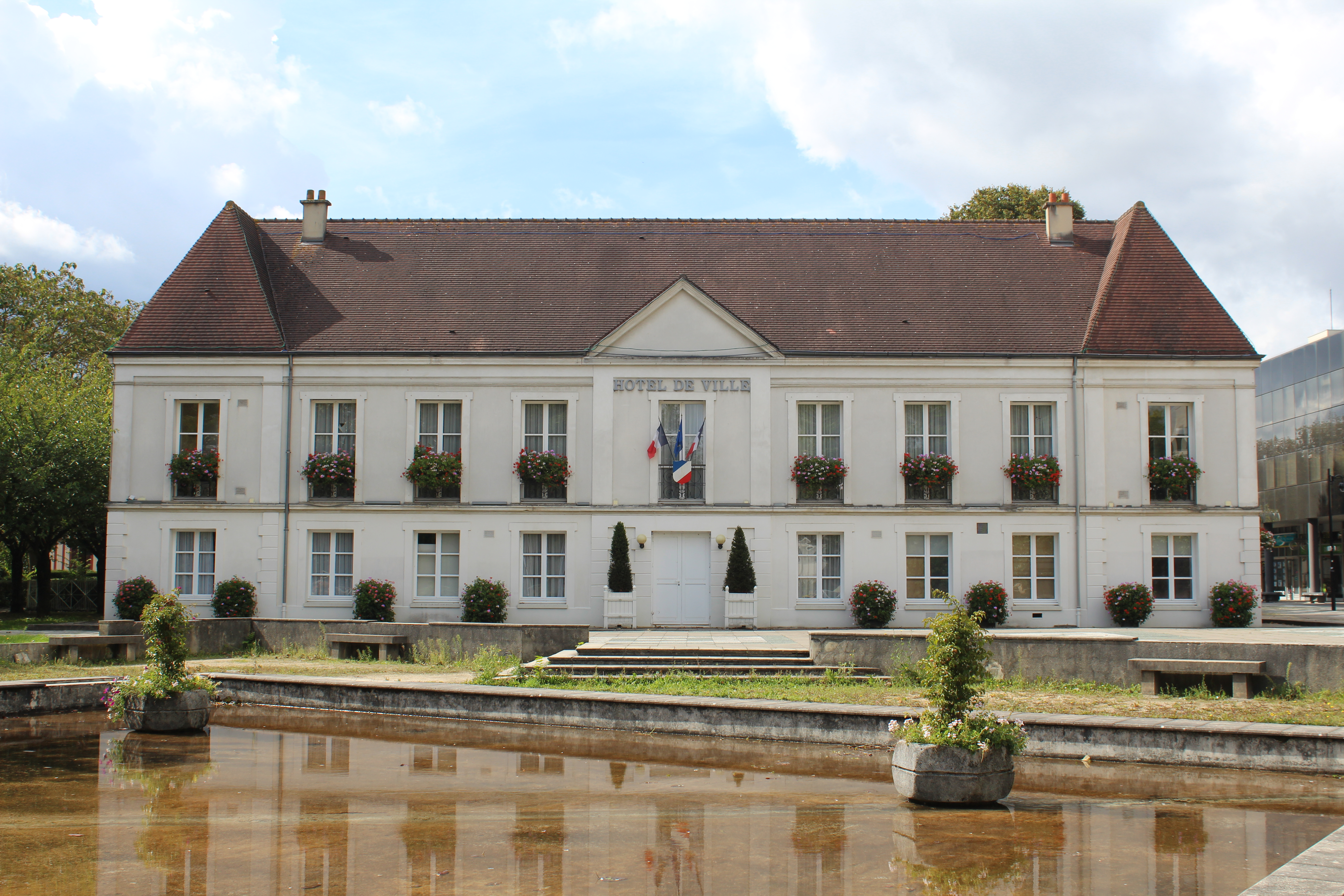 Ancien hôtel de ville de Lognes.